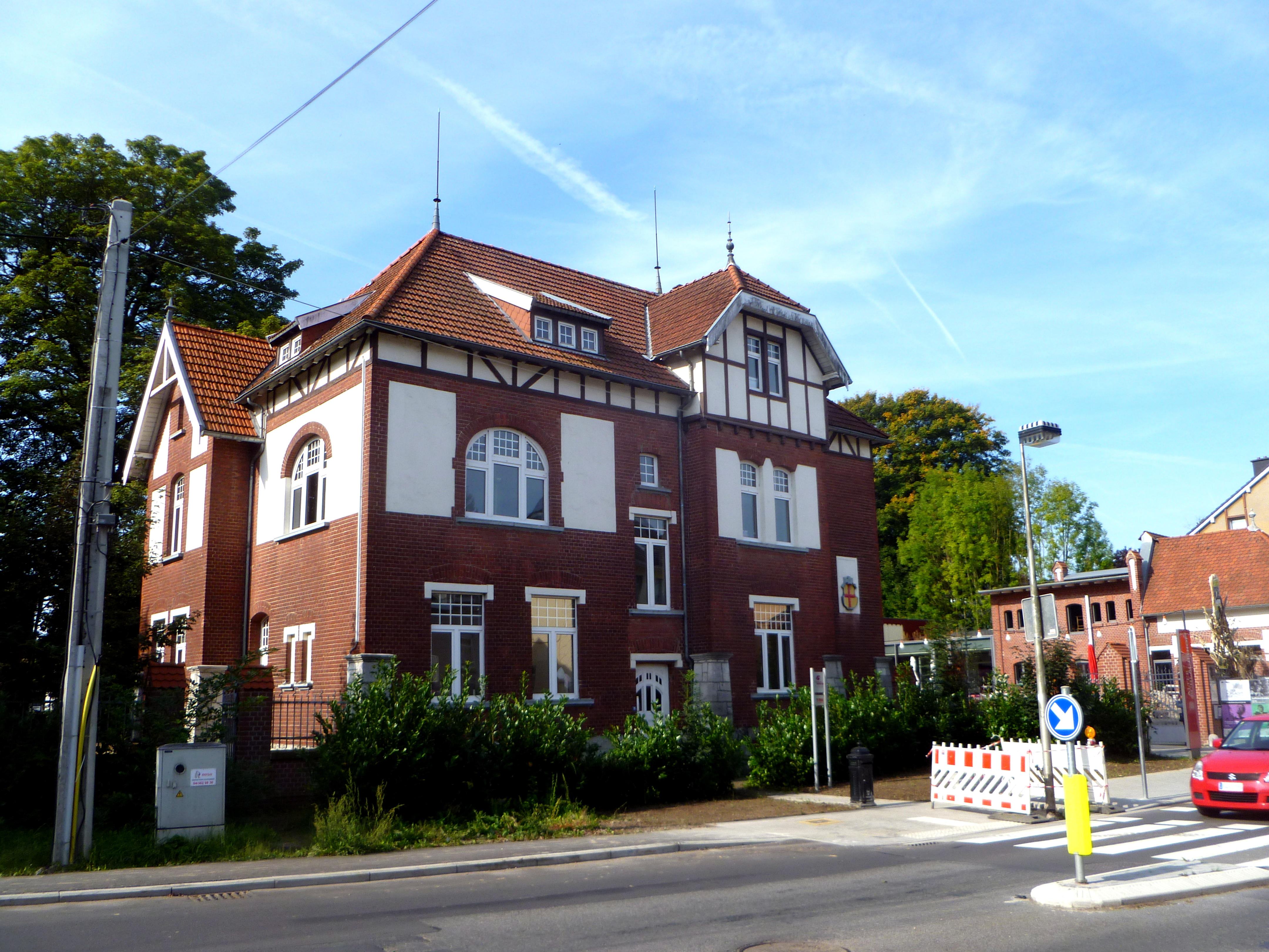 Alter Schlachthof Eupen, Haupteingang mit Direktorenwohnung und Verwaltungen